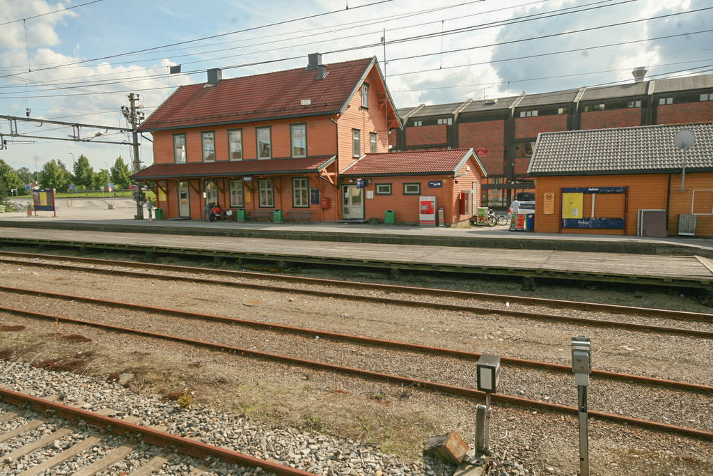 Askim stasjon